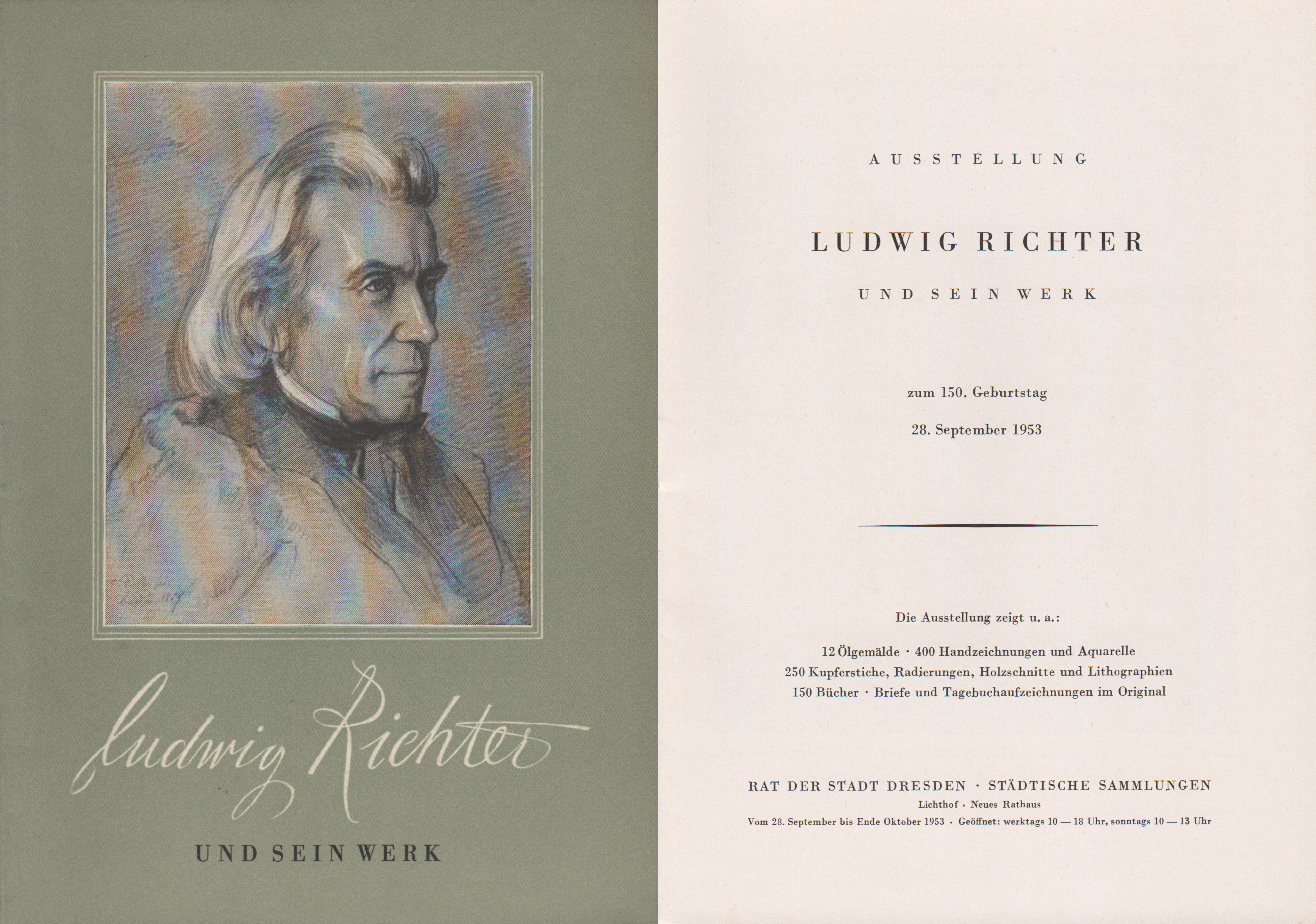 Das Ausstellungsheft zu Ludwig Richter und sein Werk enthält 16 Textseiten mit 10 Fotos zu seinen Werken, das Titelbild zeigt den Maler im Jahr 1857 (Zeichnung von Friedrich Preller), der Herausgeber war die Stadt Dresden, der EVP betrug 0,25 DM.